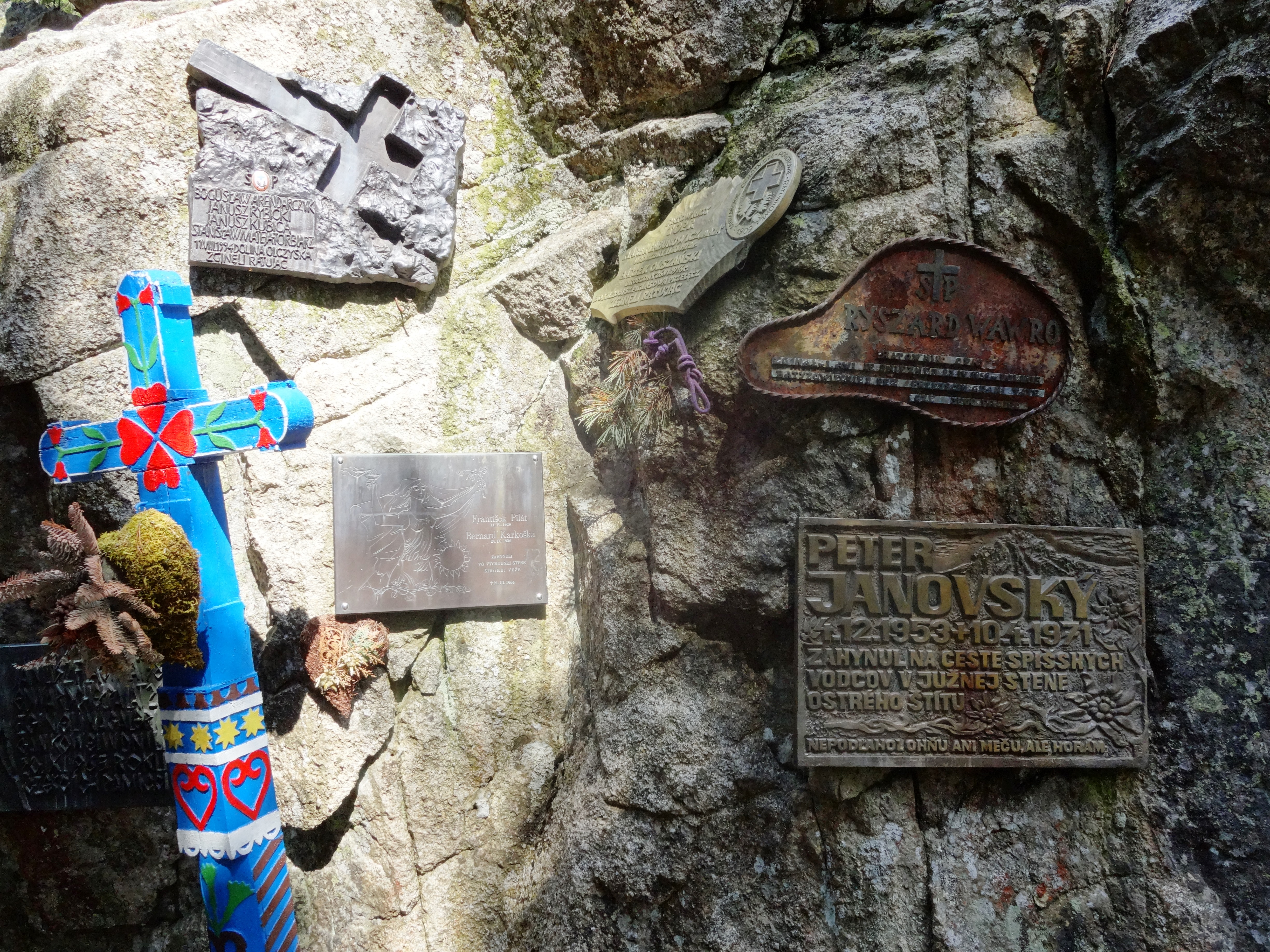 Tatrzański Cmentarz Symboliczny